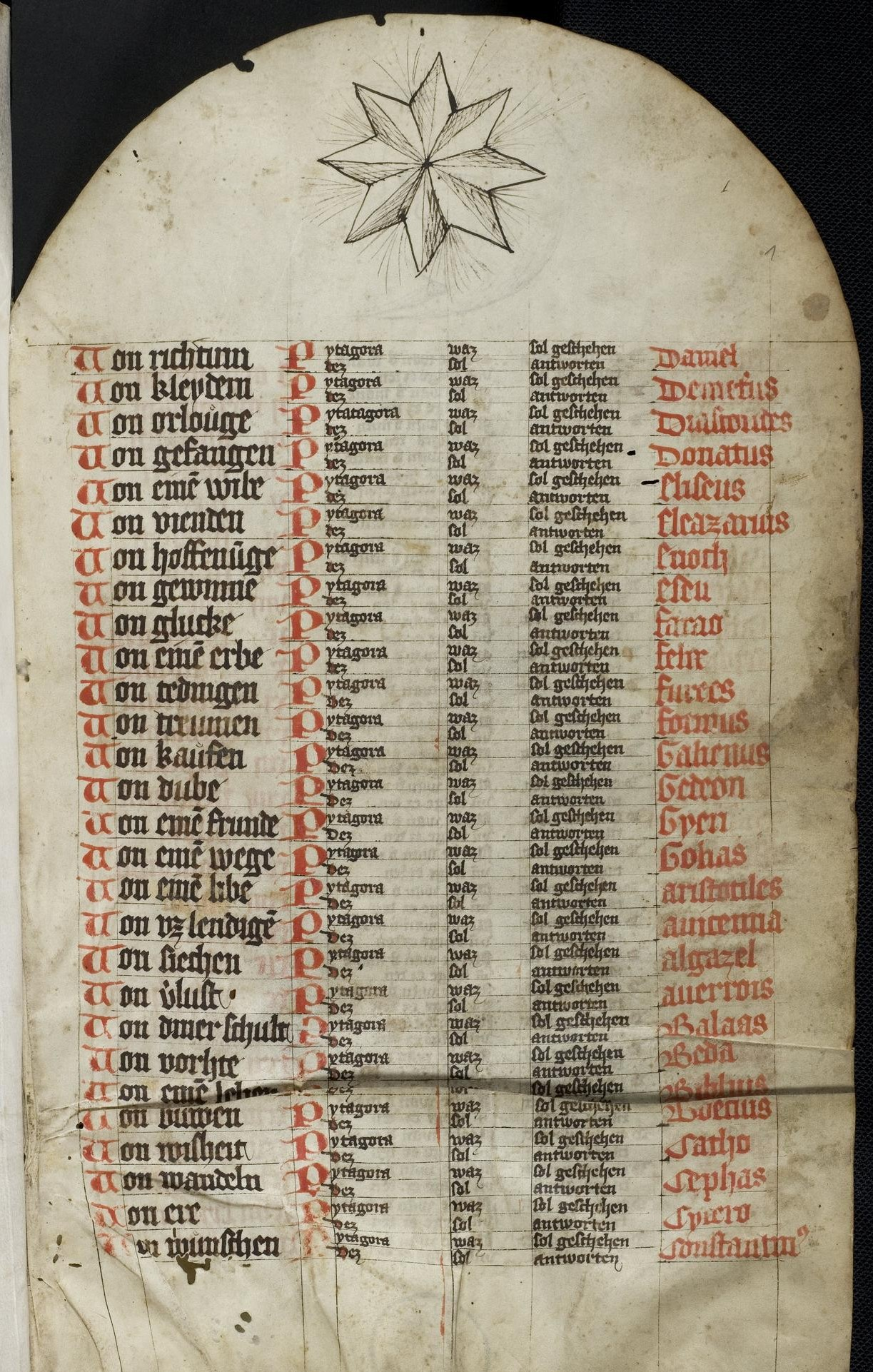 Codex Palatinus germanicus 3, Blatt 1r der Handschrift: "Mondbuch".